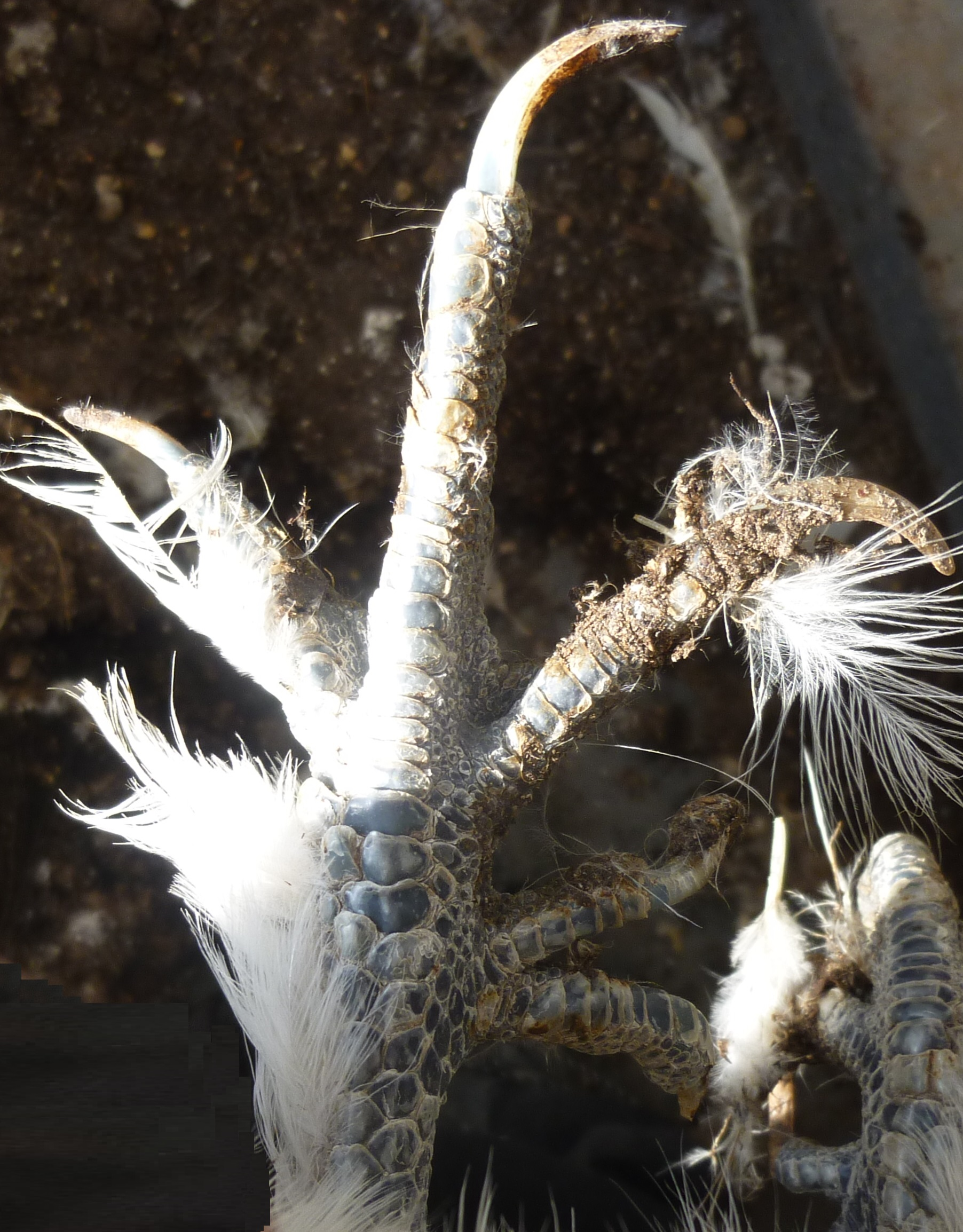 烏骨鶏の足です。